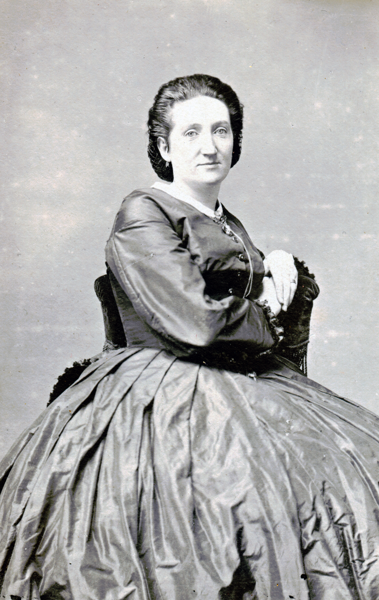 Emelie Gustafsson, skådespelare 1874